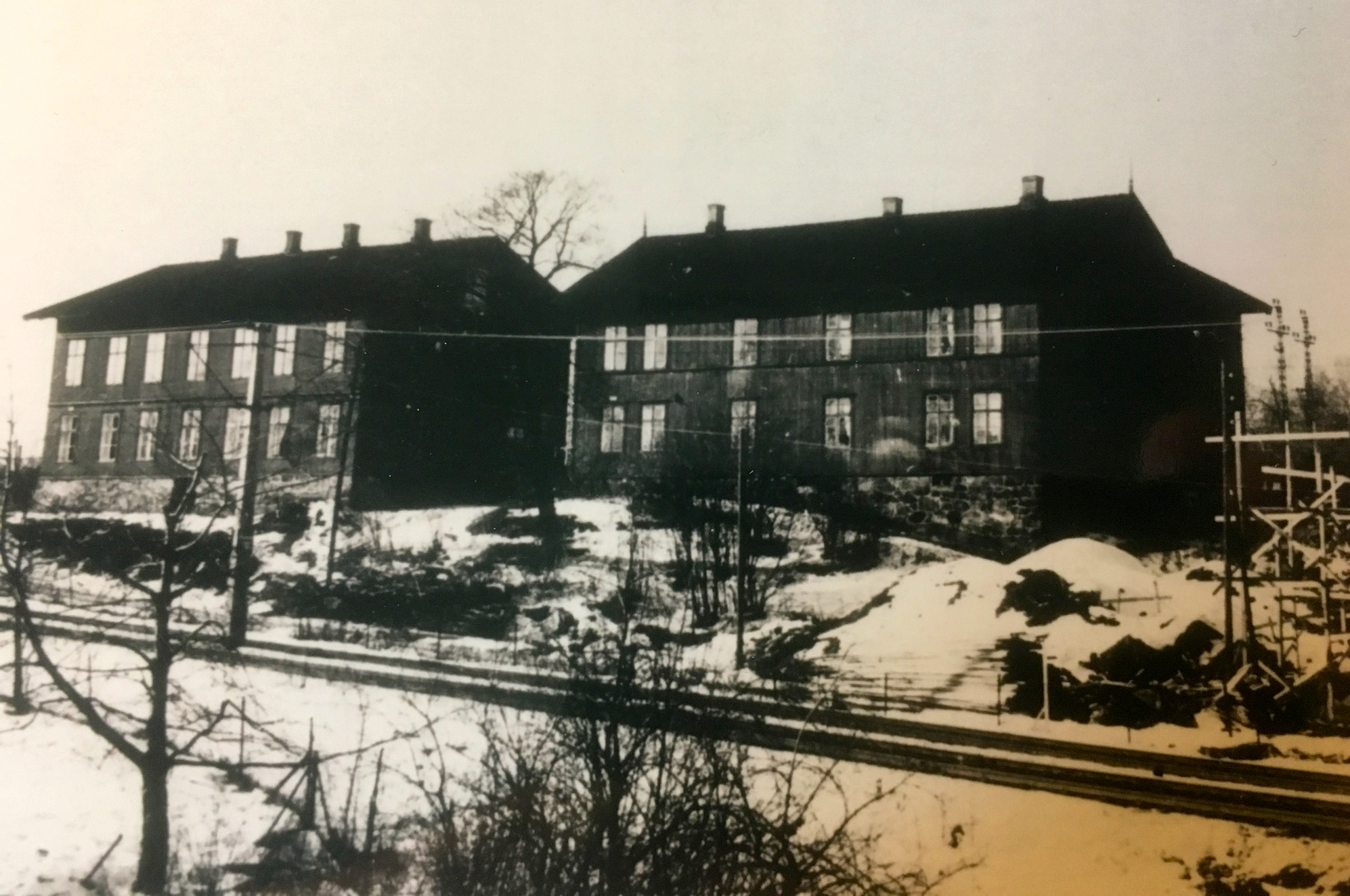 Disse to arbeiderboligene lå sentralt på Lilleaker, og ble kalt Sagførergården og Sjukehusgården. De ble begge revet på begynnelsen av 1960-tallet.